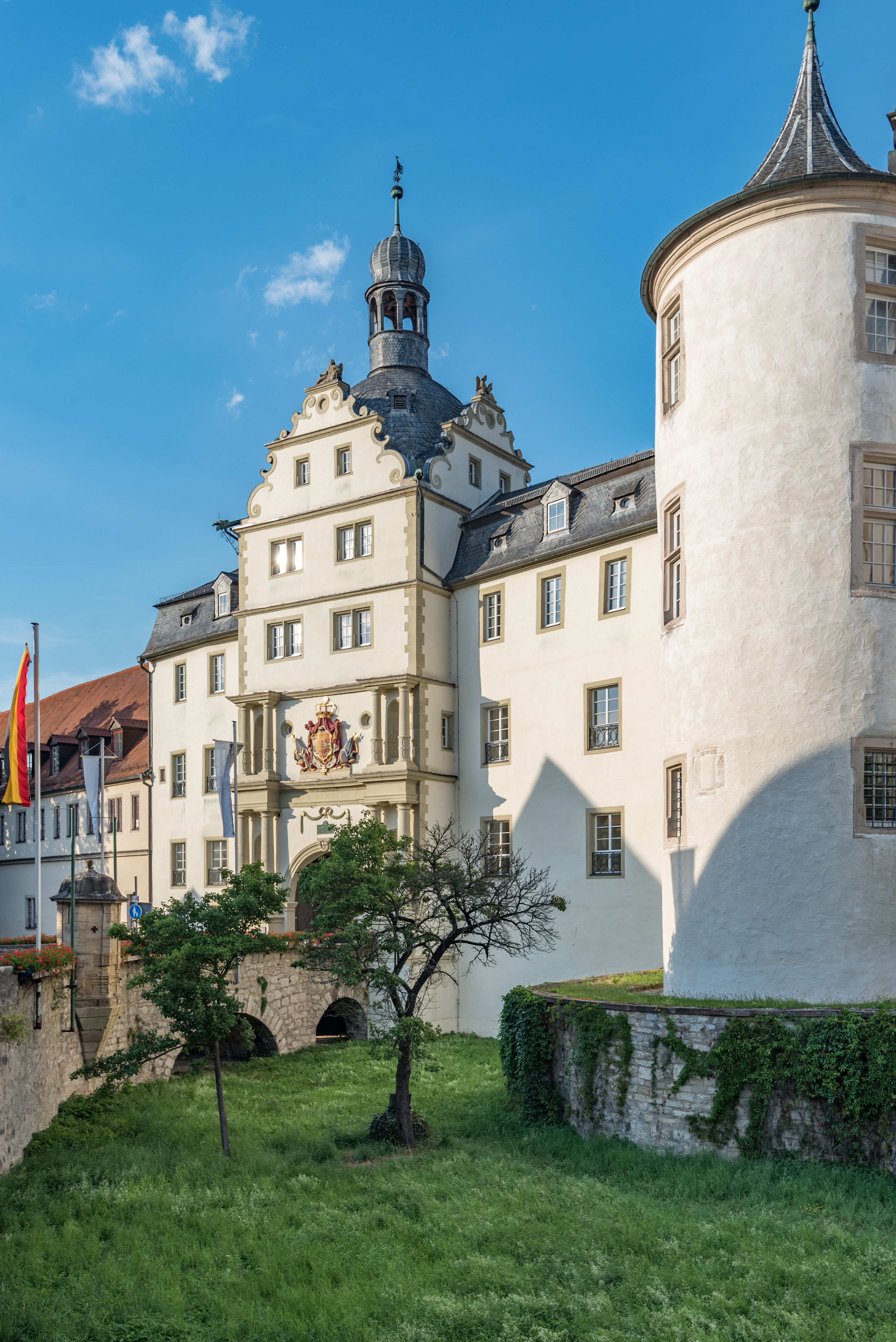 Bad Mergentheim, Schloß 1, Deutschordensschloss, Äußeres Tor